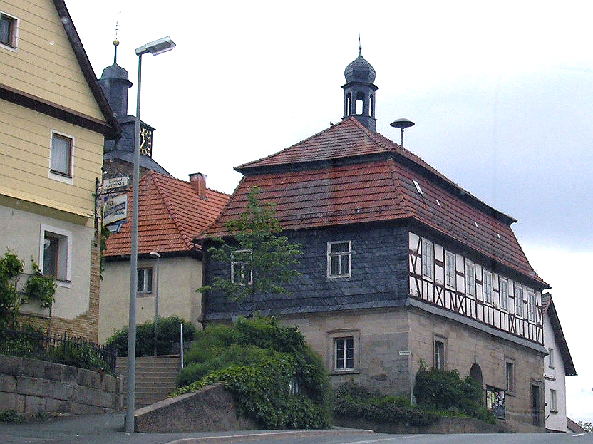 Das frühere Schul- und Brauhaus von Mainroth im Landkreis Lichtenfels (Oberfranken)